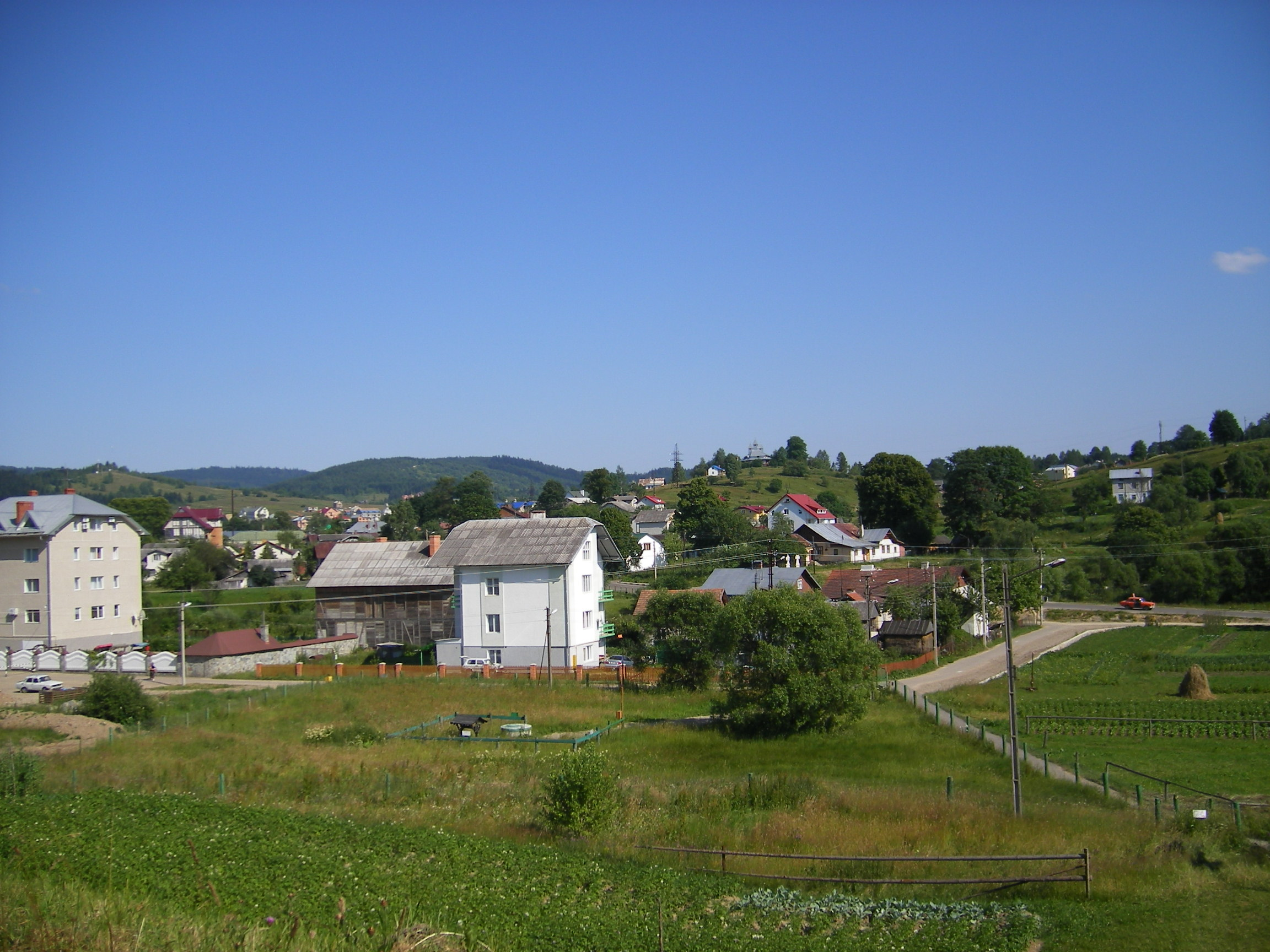 Skhidnytsia, Drohobych Raion